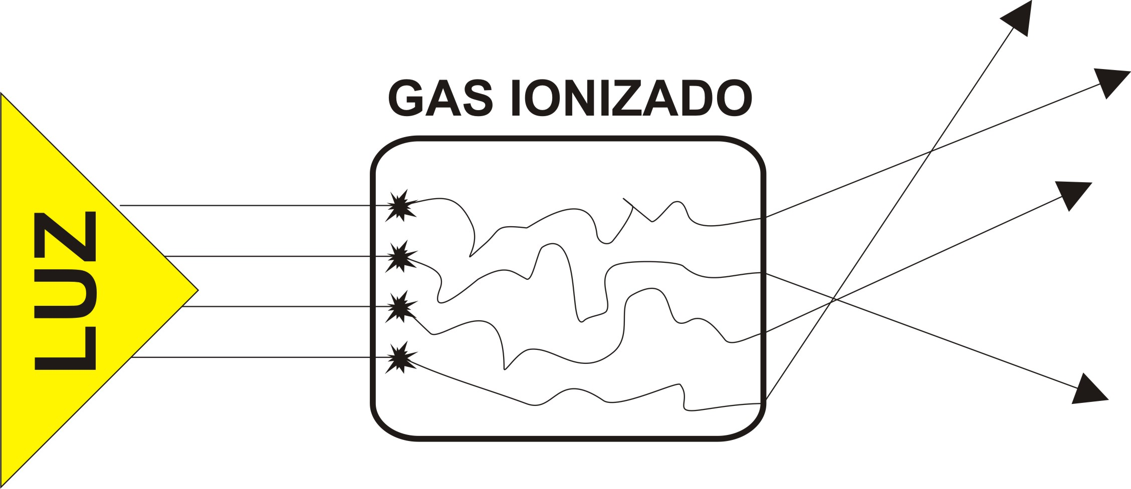 Gráfico sobre la refracción lumínica en gas ionizado.